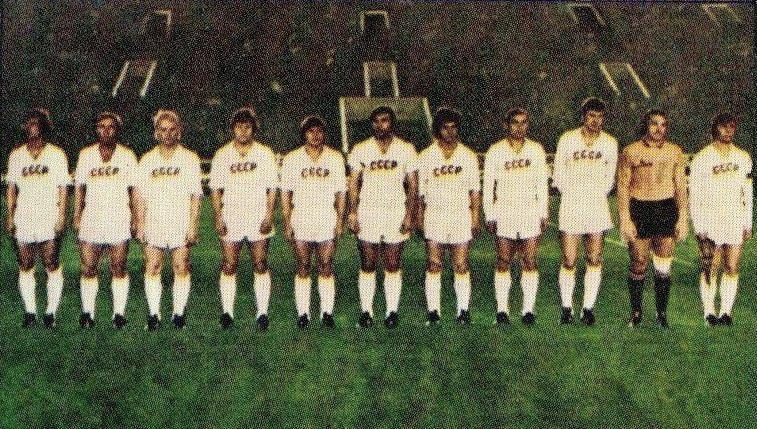 L'équipe de football olympique d'URSS, troisième du tournoi 1976, 'Montreal 76', Panini figurina n°202.